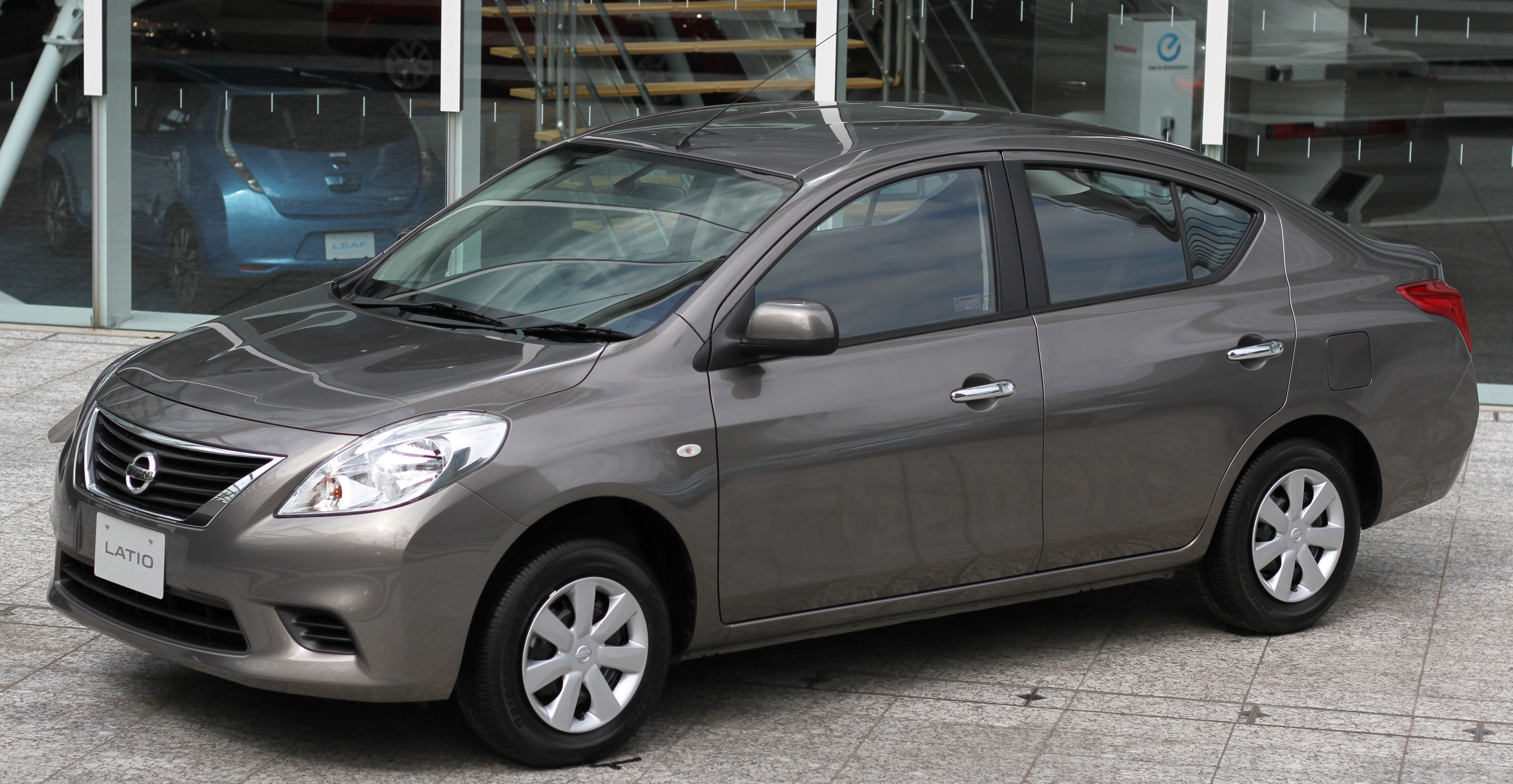 Nissan Latio